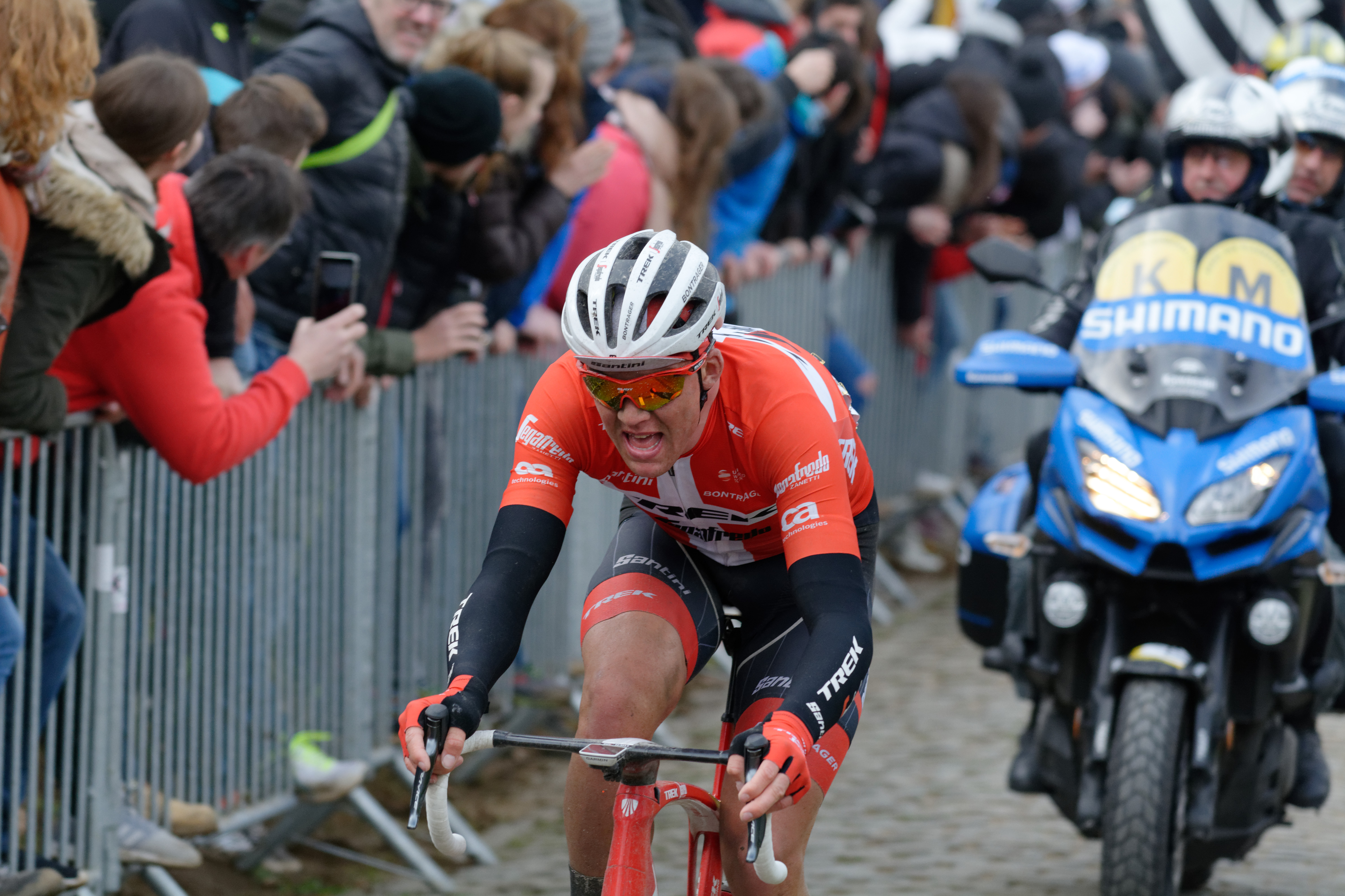 Ronde Van Vlaanderen 2018 / Tour of Flanders 2018 Oude Kwaremont